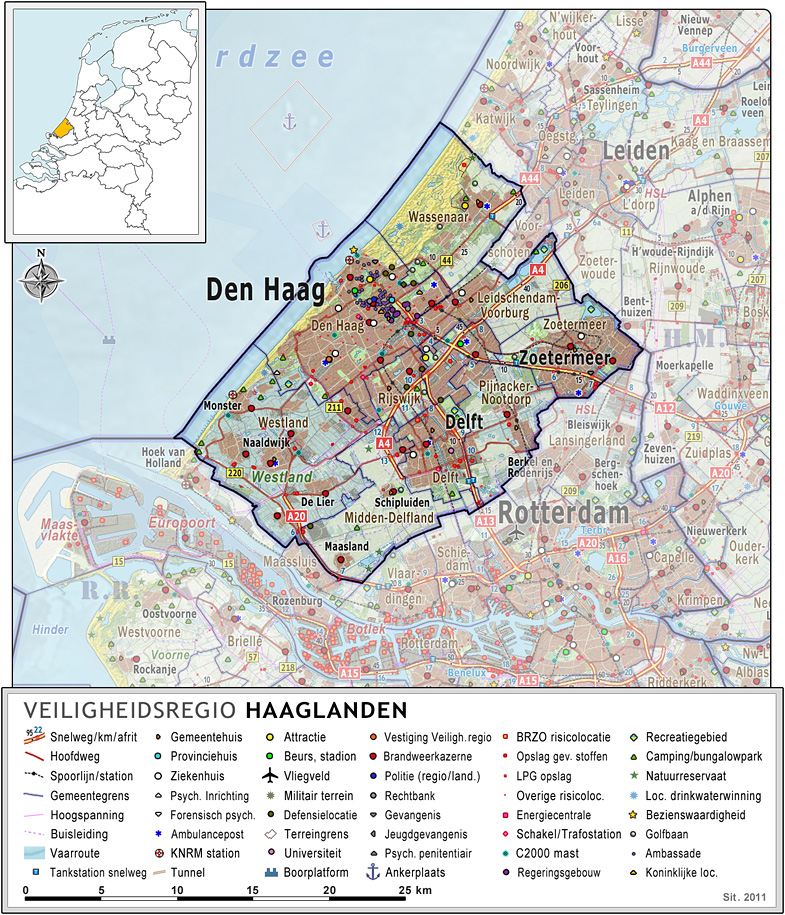 Veiligheidsregio Haaglanden, met indeling van gemeenten (2011) en impressie van het landschap. Door Jan-Willem van Aalst, samengesteld uit publiek beschikbare geo-data: Referentie-ondergrond (kustlijn, steden, wegen) gerasterd uit de OpenStreet Map OSM. ( Inhoud is beschikbaar onder de Creative Commons Attribution-ShareAlike 3.0 license. Referentie-ondergrond op water bewerkt vanuit Gebruik is vrij met bronvermelding NLR en ESA. Vectorgrenzen van gemeenten en regio's vrij ter beschikking gesteld met dank aan cartografen van brandweerregio's Hollands-Midden en IJsselland; gerasterd in Adobe Photoshop. Grenzen en kazernes in Duitsland en België vrij ter beschikking gesteld met dank aan Meldkamer Oost-Nederland, Regio Limburg-Noord en Regio Midden- en West-Brabant Hoogte-aanduidingen (reliëf) gerasterd uit de AHN Viewer ( gebruik is vrij met bronvermelding (c) AHN, BRZO risicolocaties, LPG risicolocaties, buisleidingen: op basis van de Risicokaart, Defensie locaties op basis van de lijst op Locaties C2000 masten op basis van Penitentiaire locaties op basis van Rijksoverheid site Recreatieve verblijfslocaties op basis van gebruik is vrij met bronvermelding "(c) Kenniscentrum Recreatie". Natuurreservaten op basis van Kilometerpalen (iedere 5 km) op basis van Stichting Incident Management Nederland ( vrij bruikbaar met bronvermelding Overige kenmerken op de kaart: eigen tekenwerk van Jan-Willem van Aalst, op basis van OpenStreet Map en gerasterde CBS gemeentegrenzen.